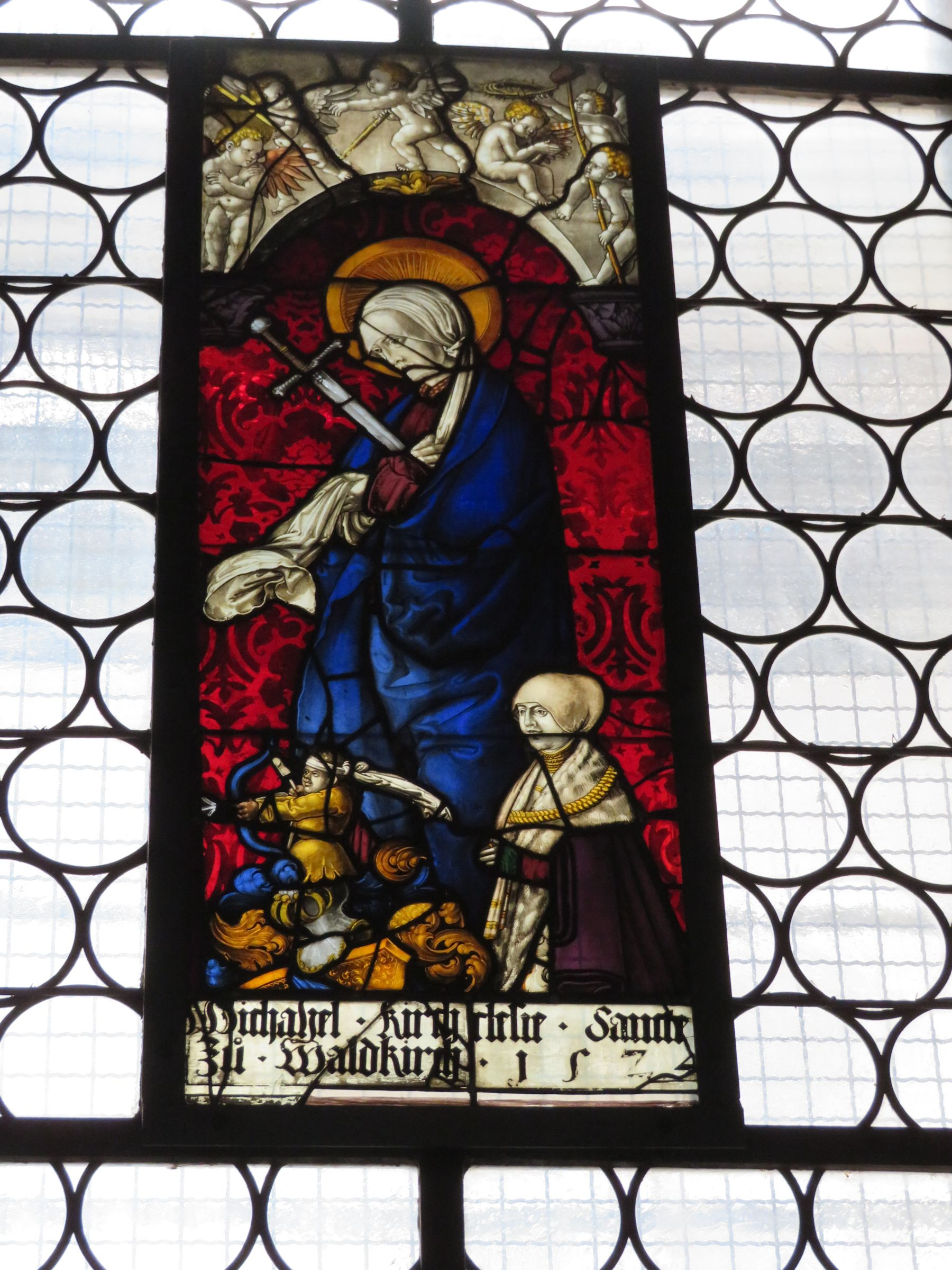 St. Nikolaus in Elzach